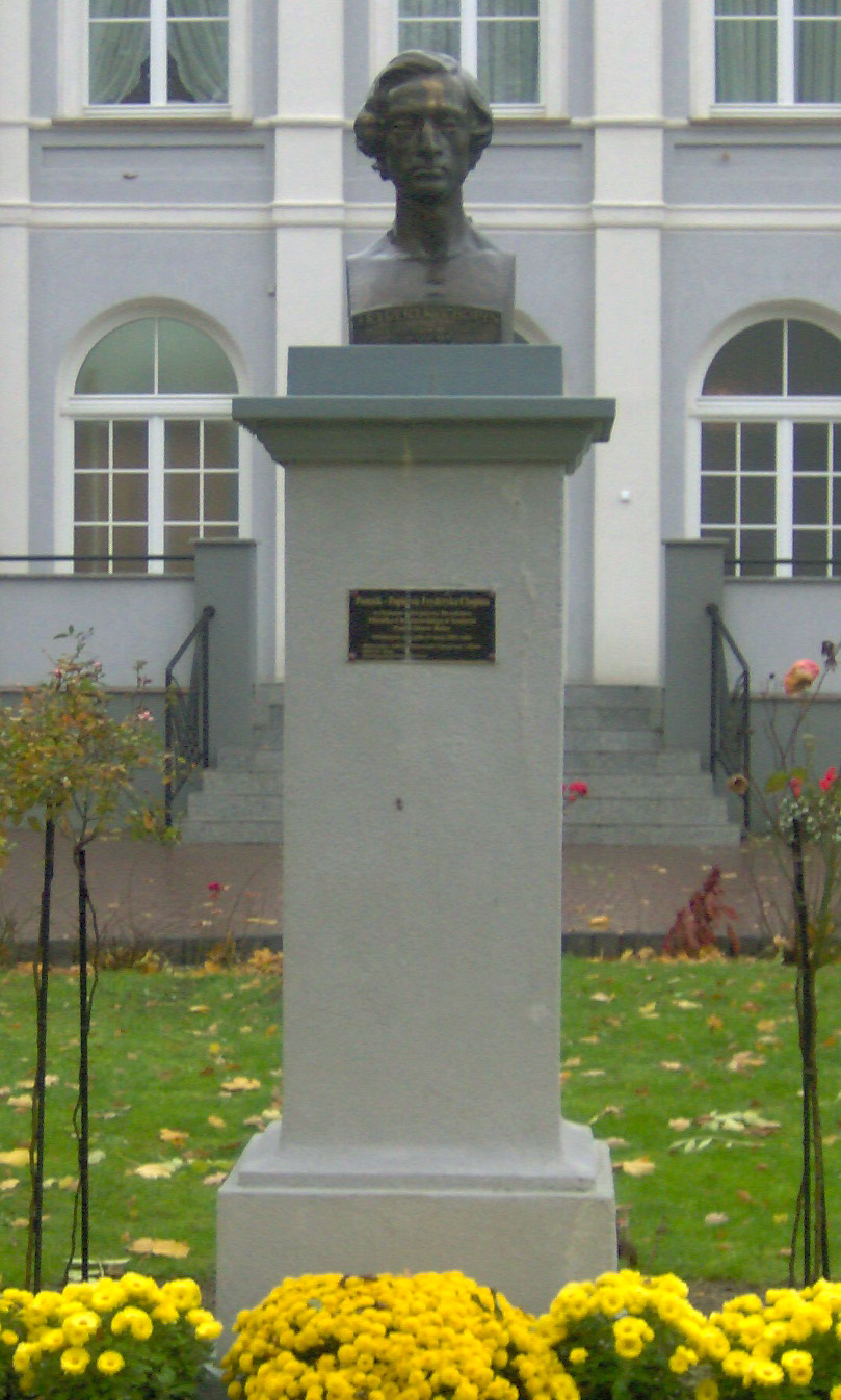 Frédéric Chopin memorial in Szafarnia